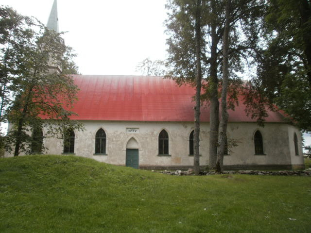 Linnusekohast põhjaloodesse jääv Lielsalaca luteri kirik, mida ehitati linnusevaremeid lammutades.